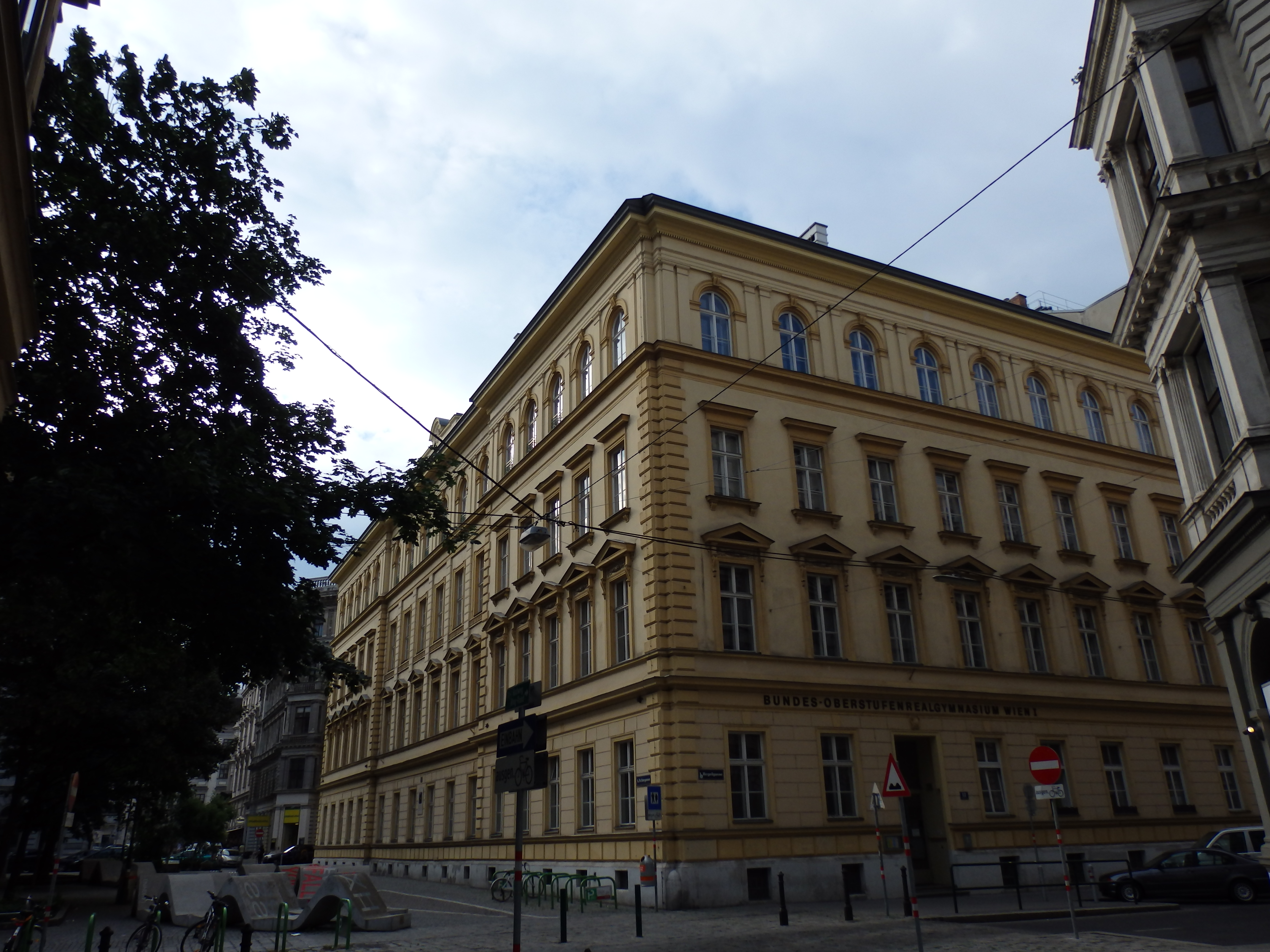 Realgymnasium (1868-70) von Heinrich von Ferstel, Fichtegasse 3, Wien-Innere Stadt